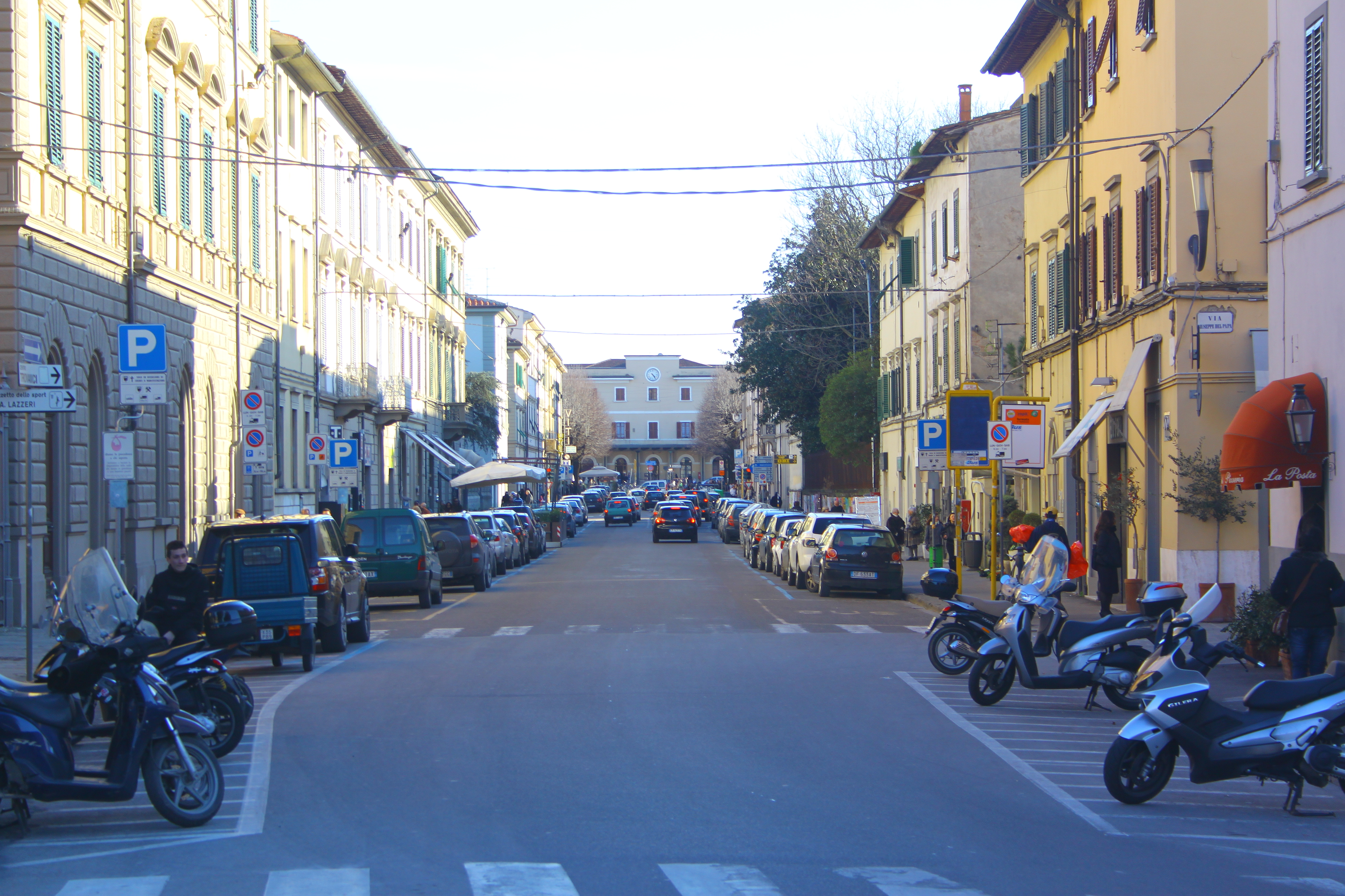 Via Roma in Empoli